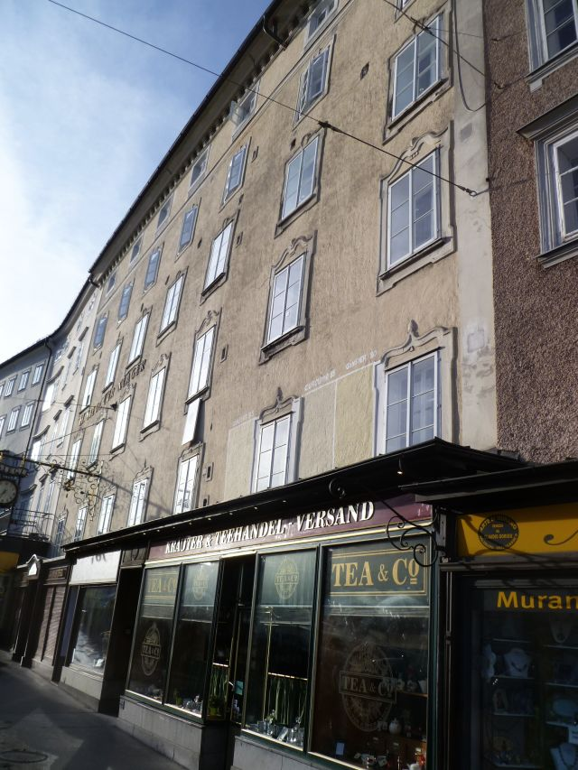 Bürgerhaus, Griesbaderhaus